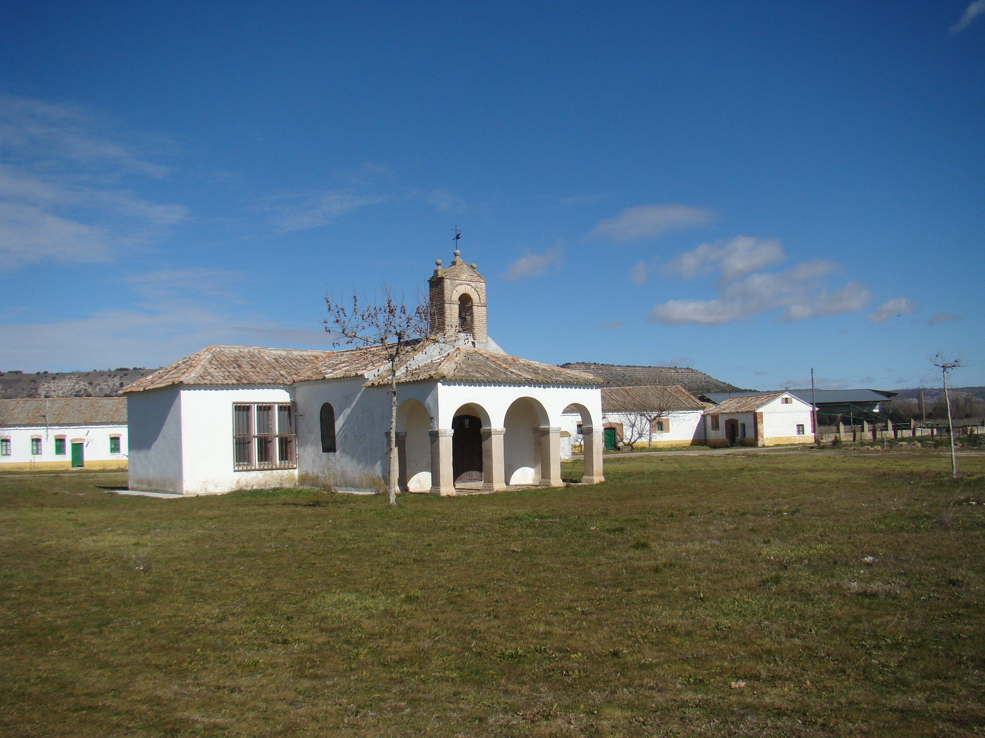 Ermita en Sardoncillo o granja de Sardón, Valladolid, España. A poca distancia de la localidad de Sardón del Duero al otro lado del Canal del Duero y río Duero.